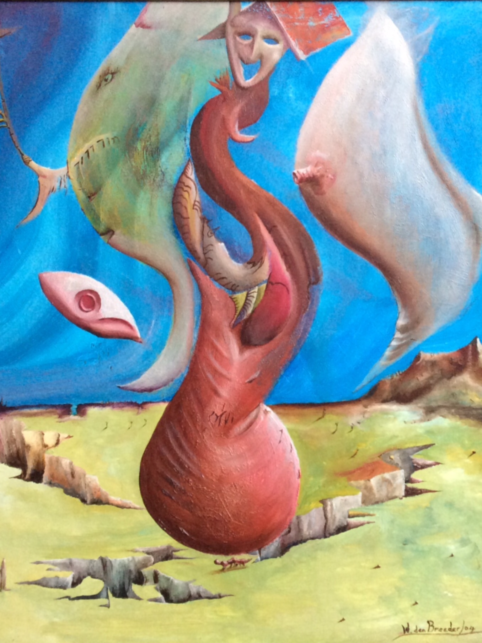 Olieverf op doek. 50x60cm